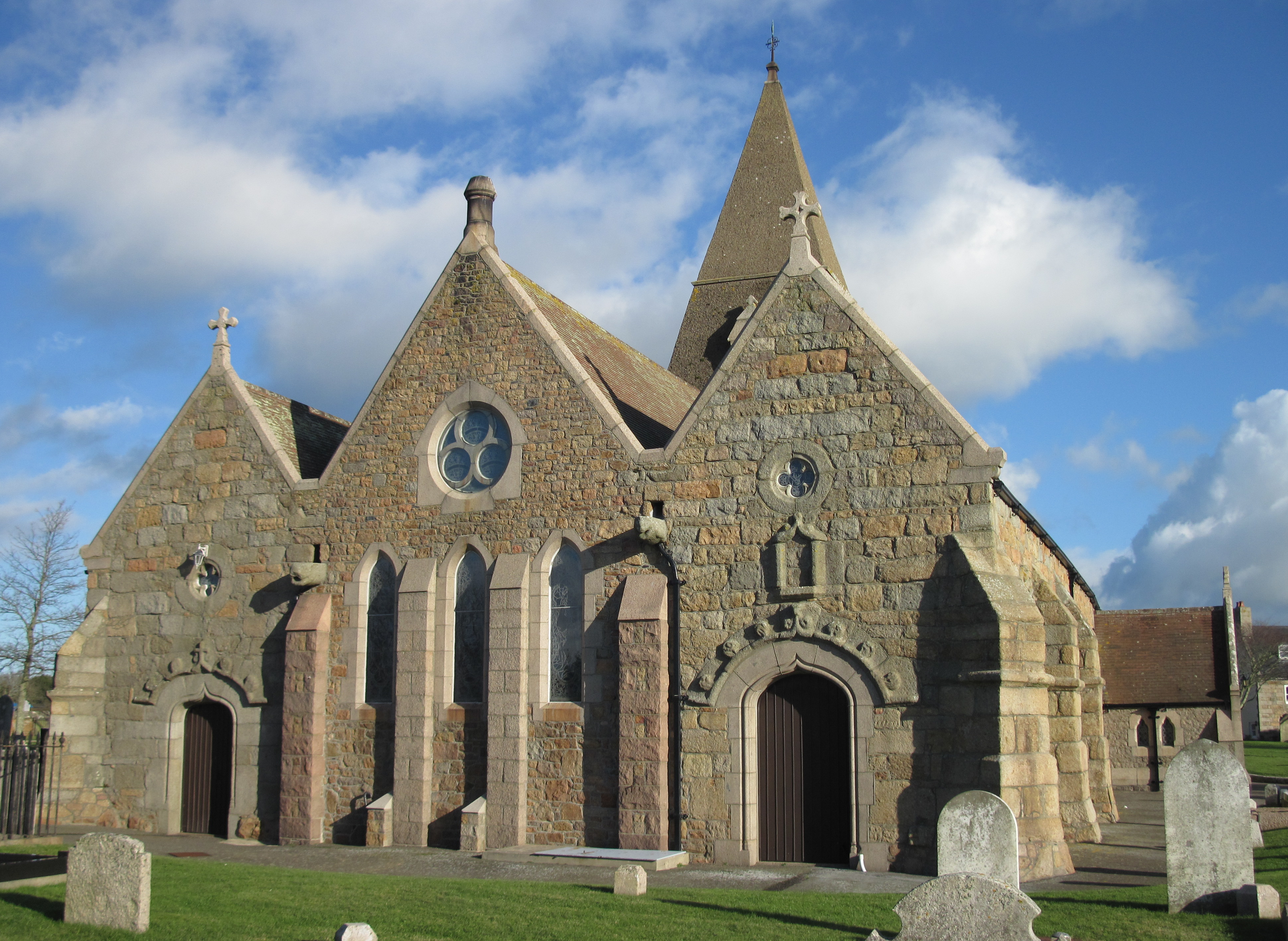 Nrf: Églyise dé Saint Ouën, Jèrri